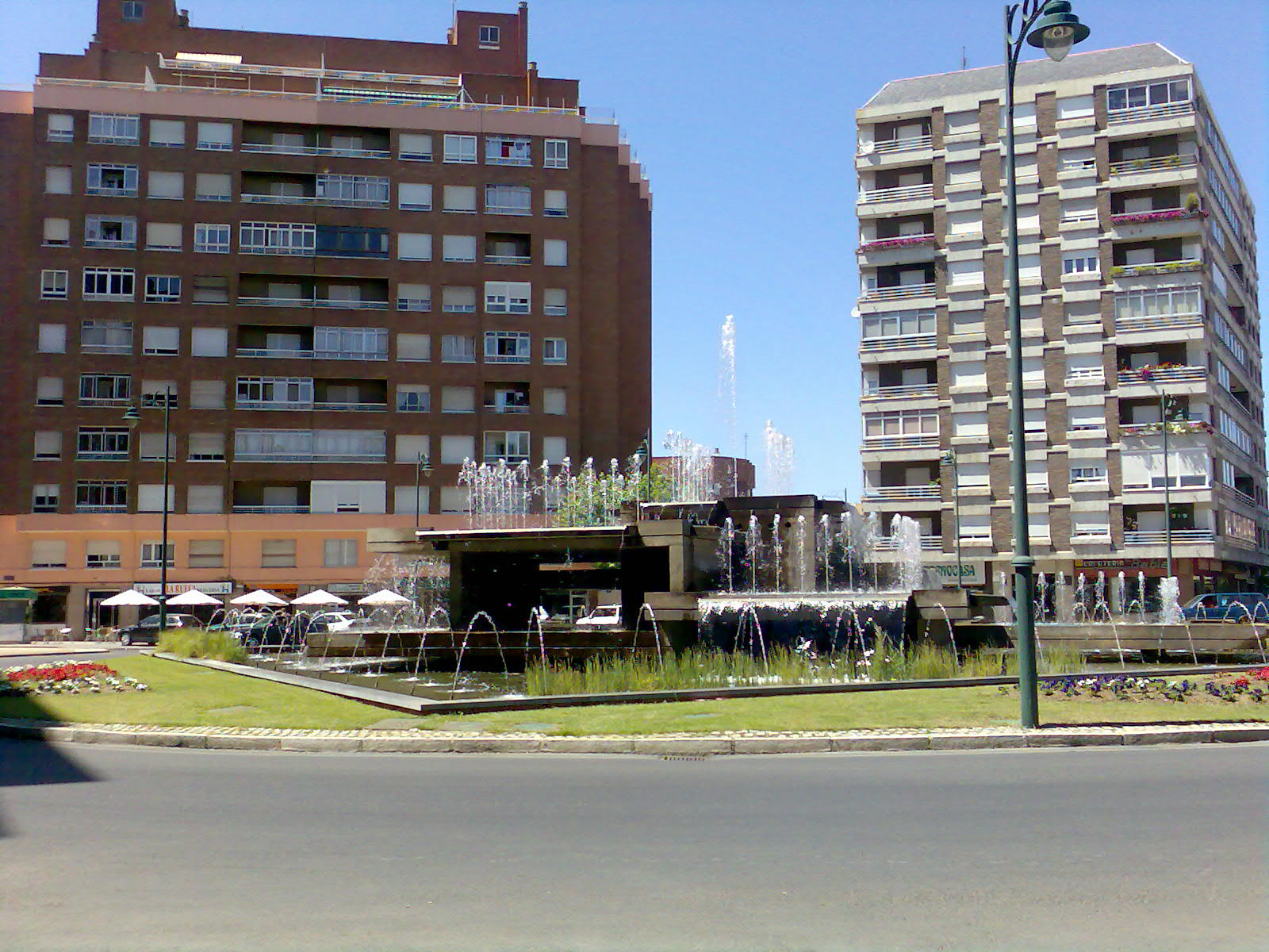 Glorieta de Pinilla en León. El barrio de El Crucero surgió a raíz de la implantación del ferrocarril y el desarrollo industrial en torno a la estación.